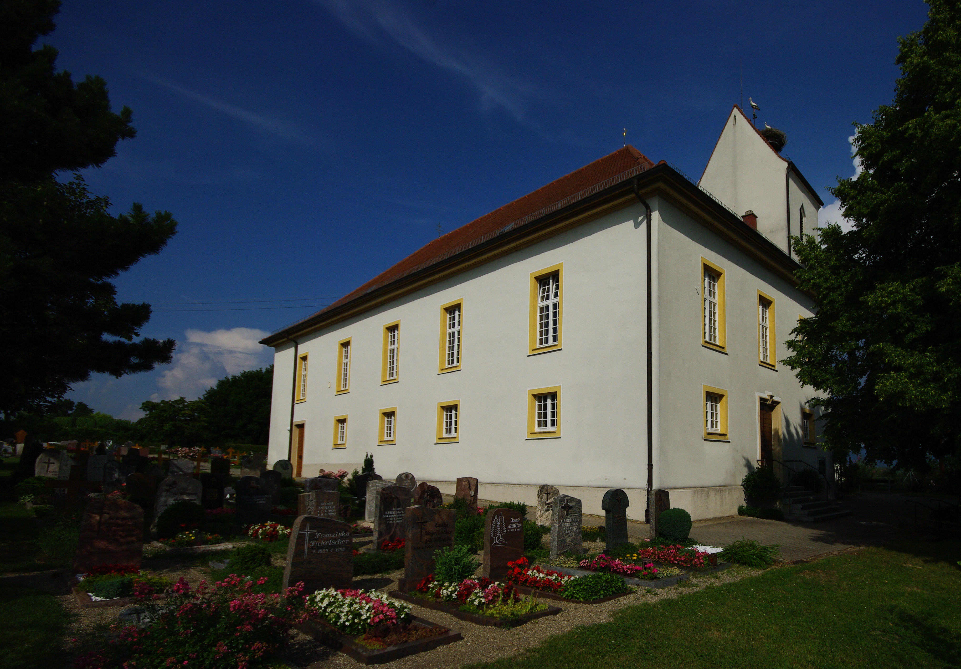 Historische Bergkirche Opfingen (1778)